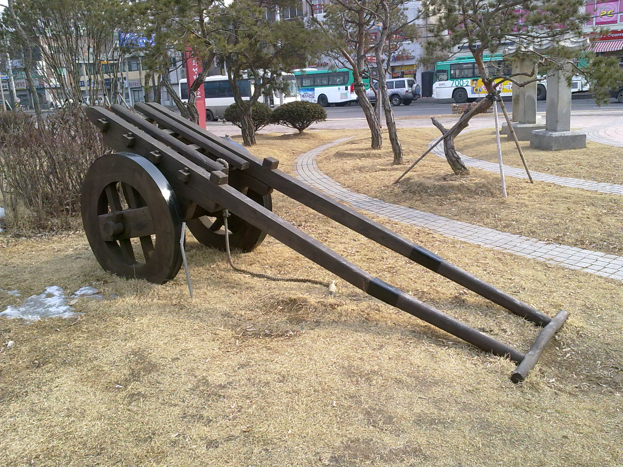 수원 화성 만들 때 쓴 유형거 (수원화성박물관 앞에 있는 것)